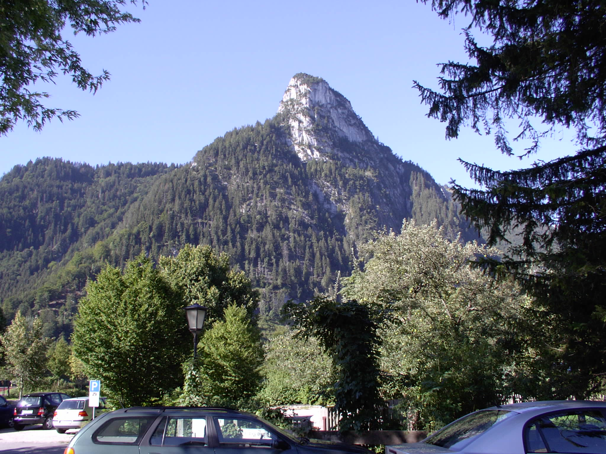 Der Berg Kofel